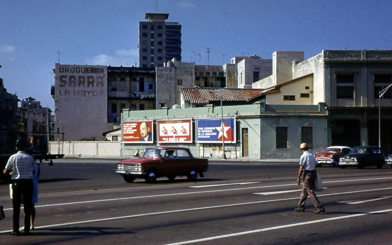 Гавана